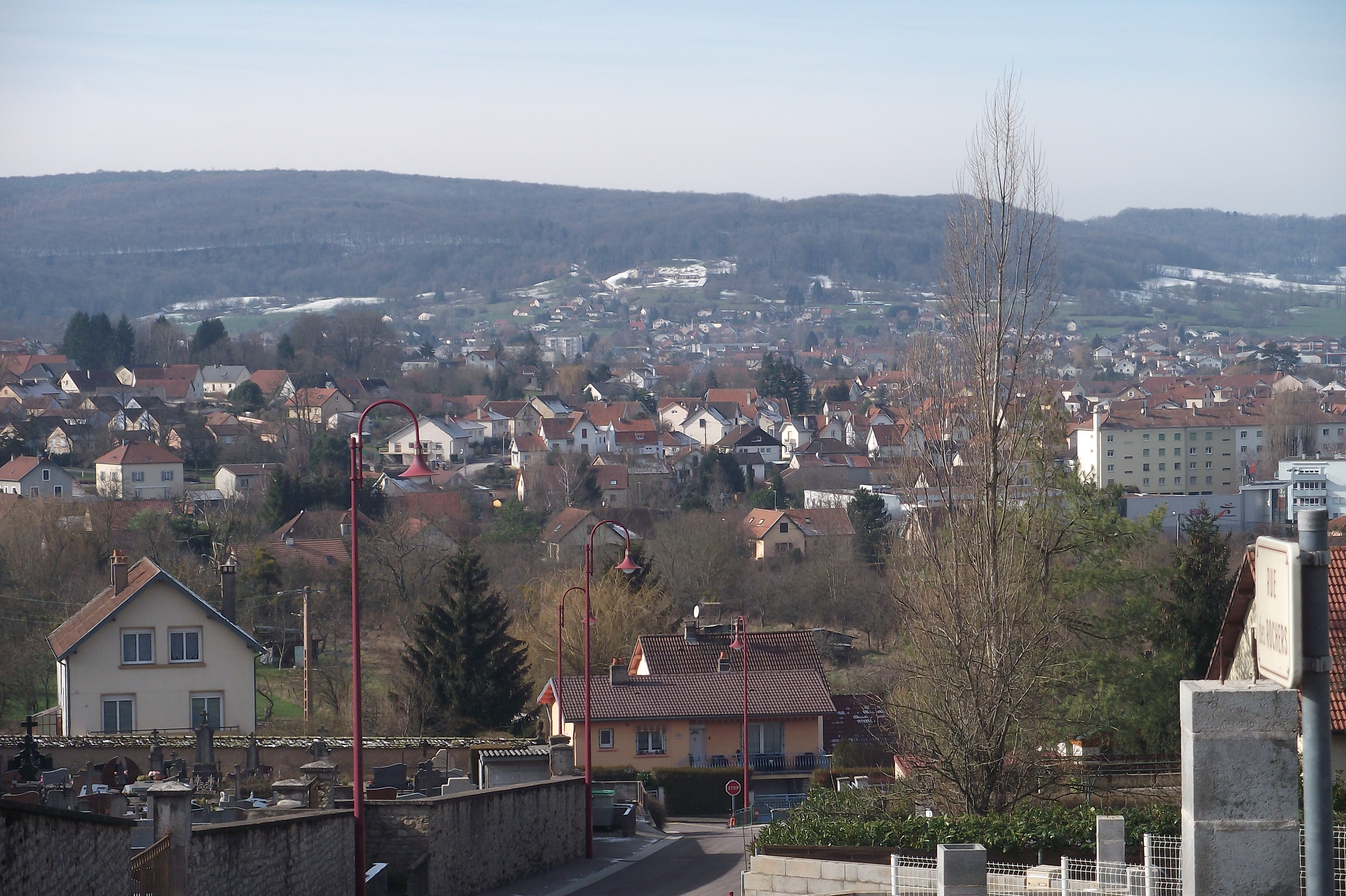 La commune de Navenne et le sud de Vesoul